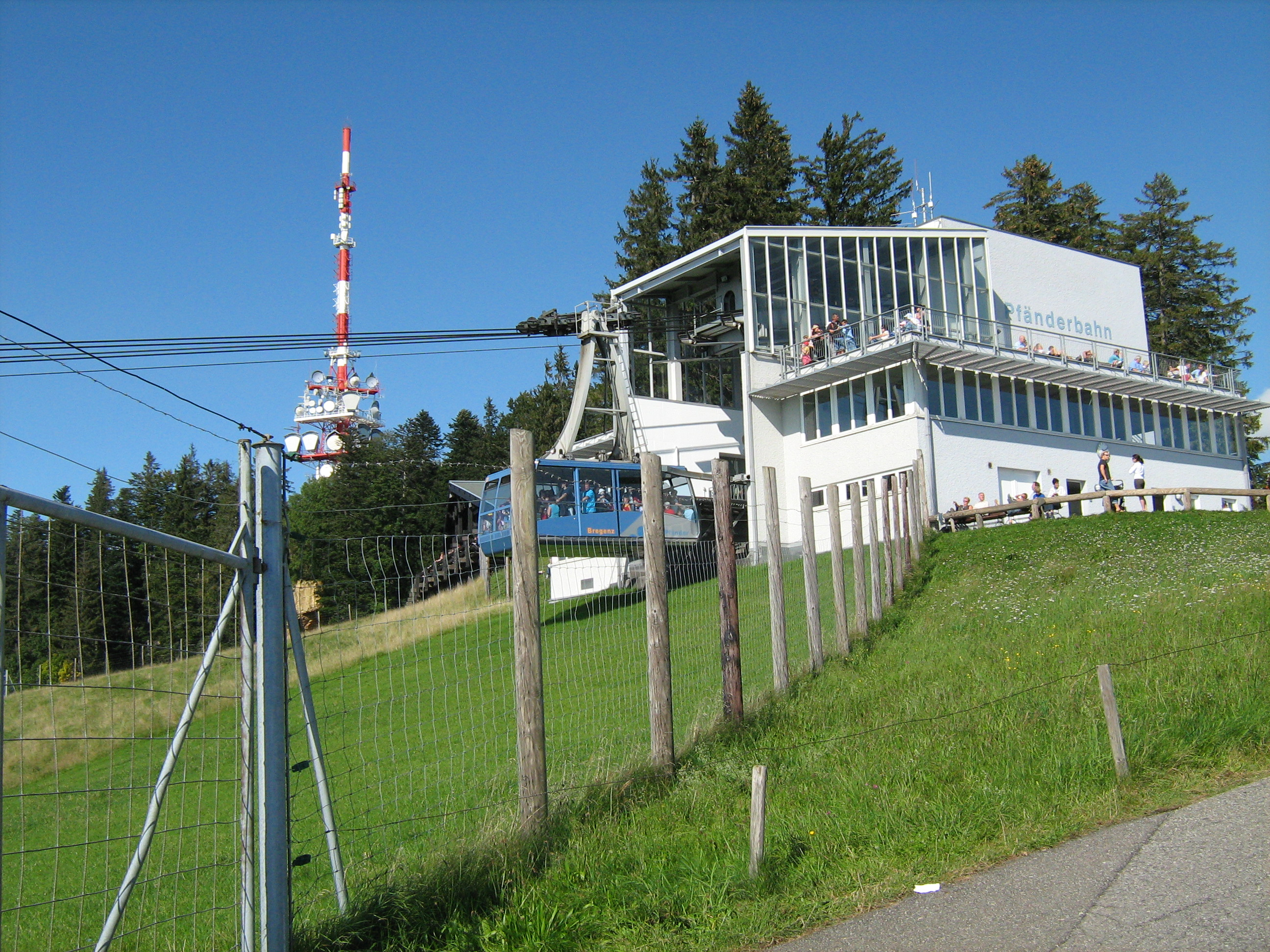 Pfänderbahn oben (Austria).